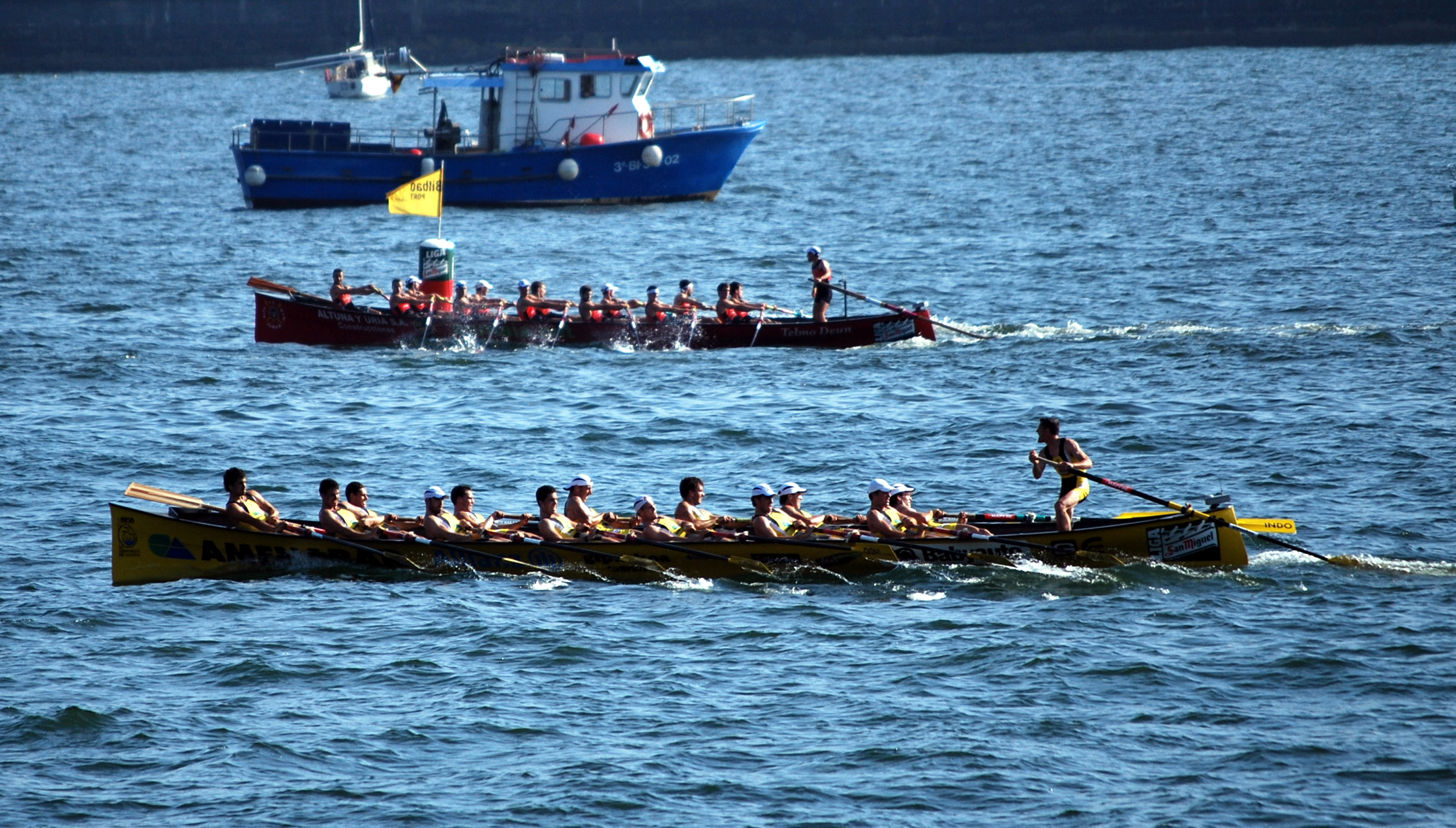 Départ de la première manche à Getxo (Biscaye).